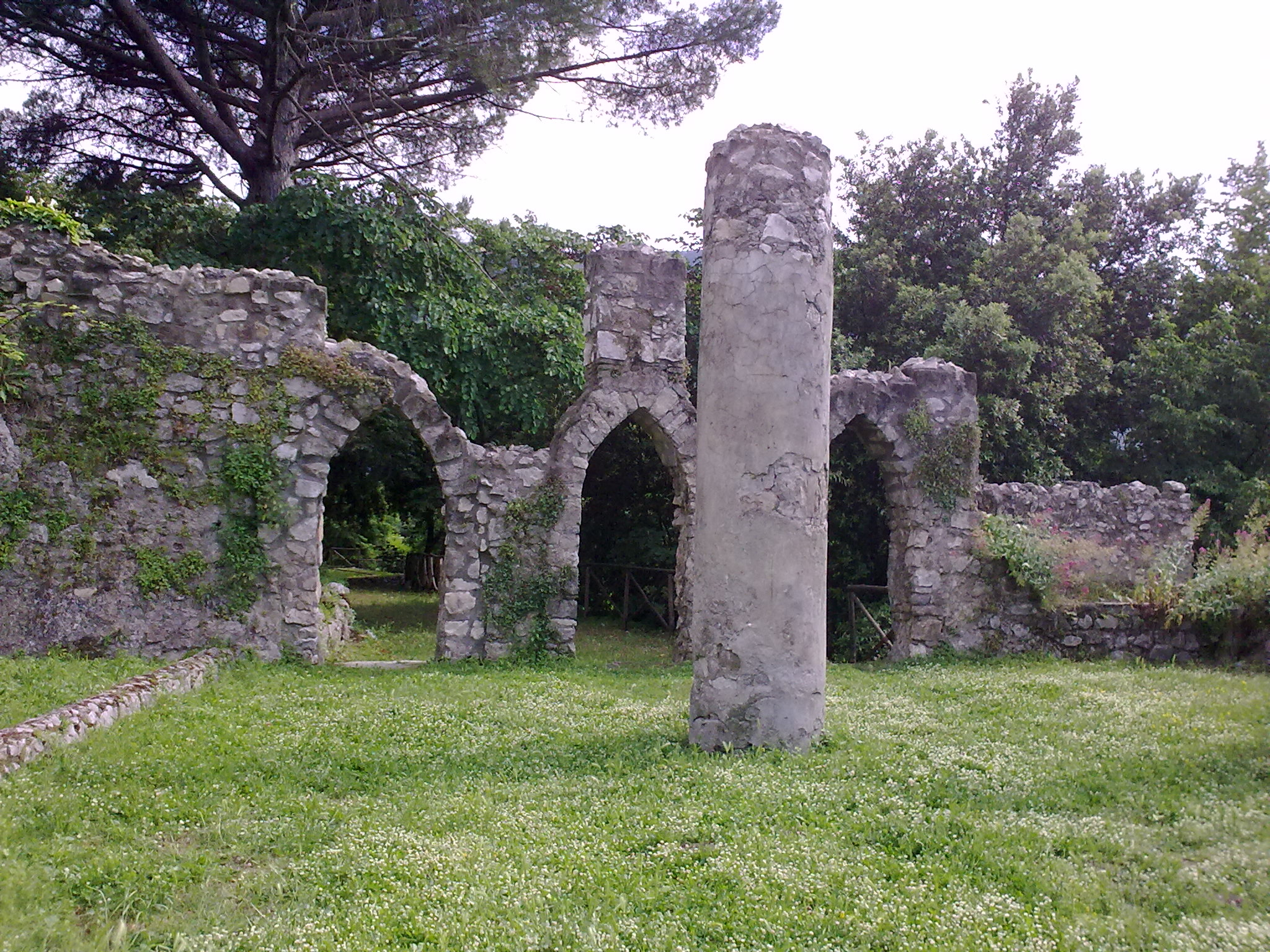 Ruderi del Castello del Parco di Nocera Inferiore, la "voliera"